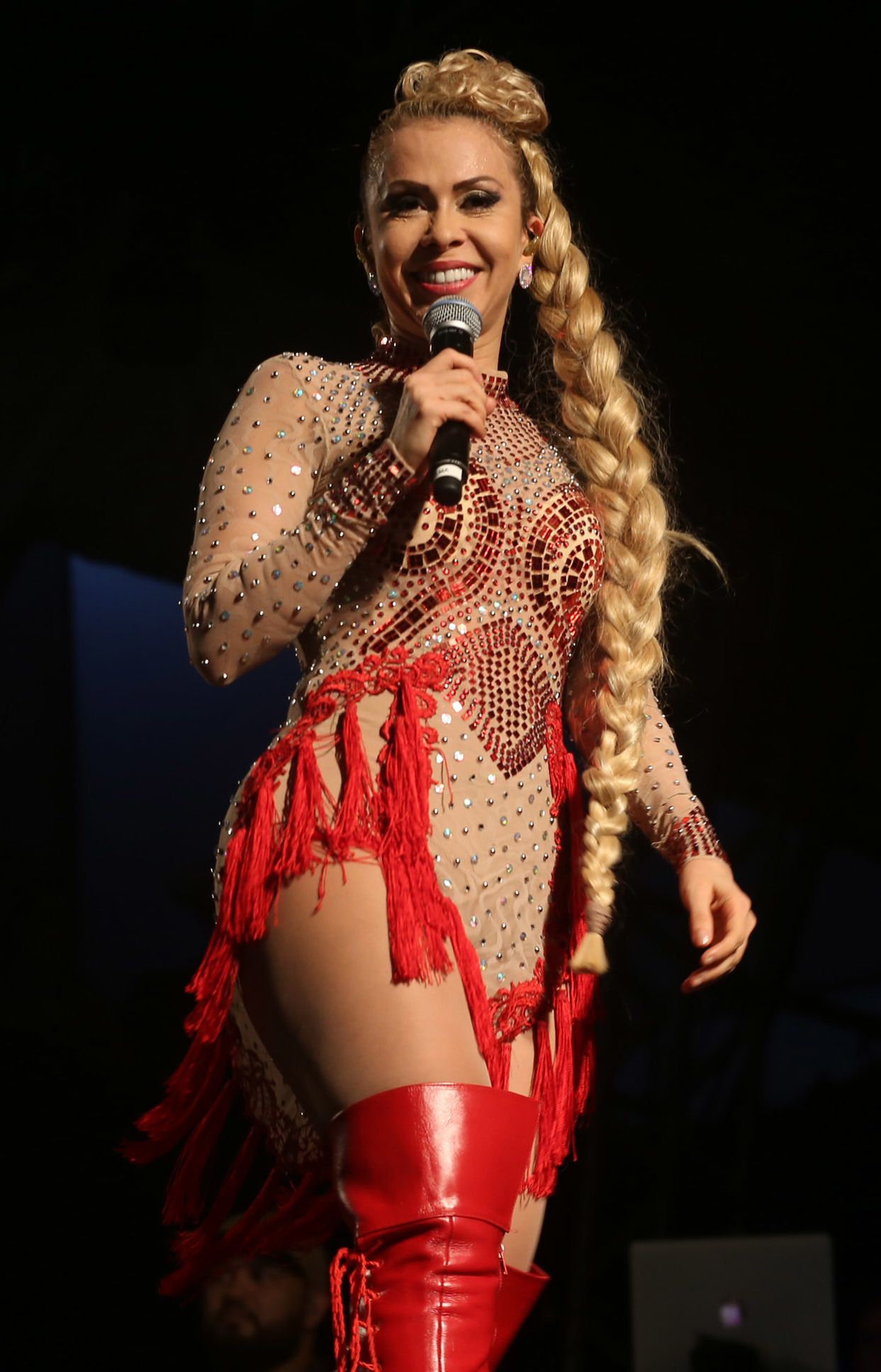 Joelma se apresentando em sua Avante Tour na cidade de Aracaju, Sergipe, em junho de 2018.